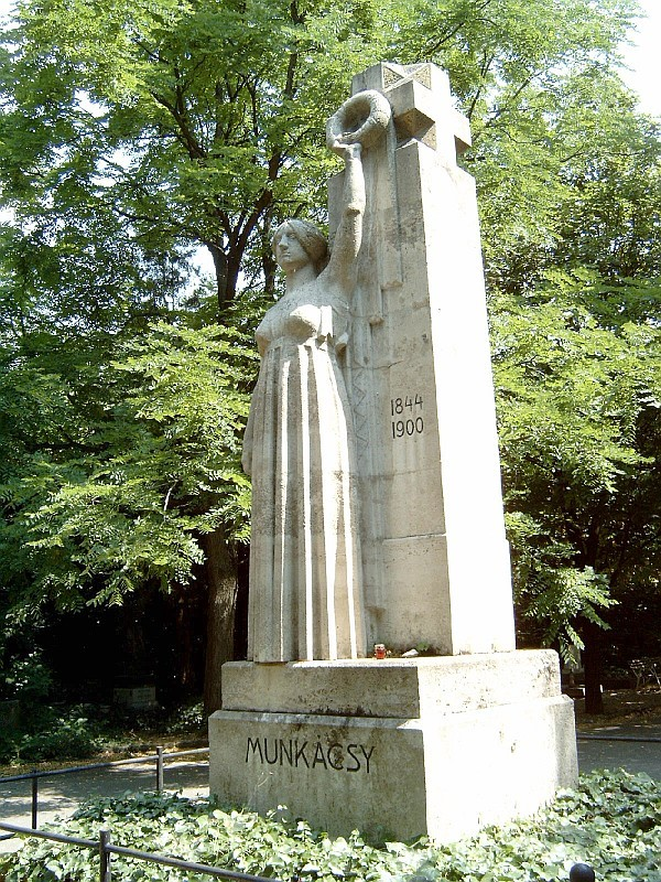 Munkácsy Mihály sírja Budapesten. Telcs Ede szobrászművész alkotása (1911) Kerepesi temető: 33/34-sziget.